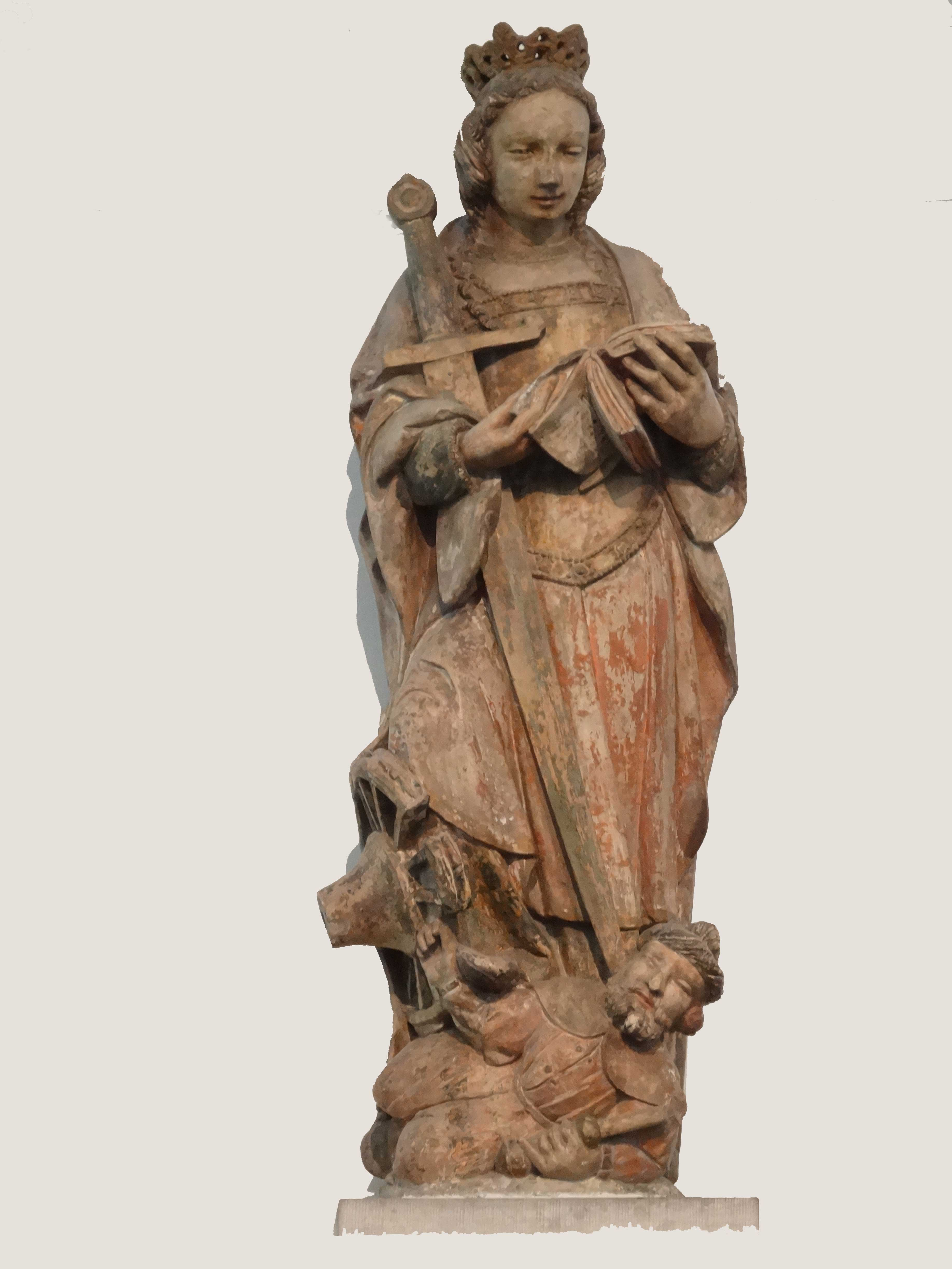 Gepolychromeerd zandstenen beeld van de heilige Catharina, beeld afkomstig uit Noord-Frankrijktitle QS:P1476,nl:"Gepolychromeerd zandstenen beeld van de heilige Catharina, beeld afkomstig uit Noord-Frankrijk" label QS:Lnl,"Gepolychromeerd zandstenen beeld van de heilige Catharina, beeld afkomstig uit Noord-Frankrijk"